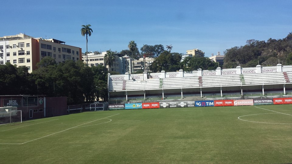 Foto do Estádio de Laranjeiras, do Fluminense Football Club, que completará 100 anos em 11 de maio de 2019.